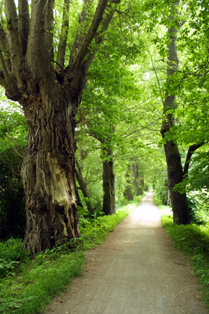 Stromová alej "Kilometrovka" v Plzni.